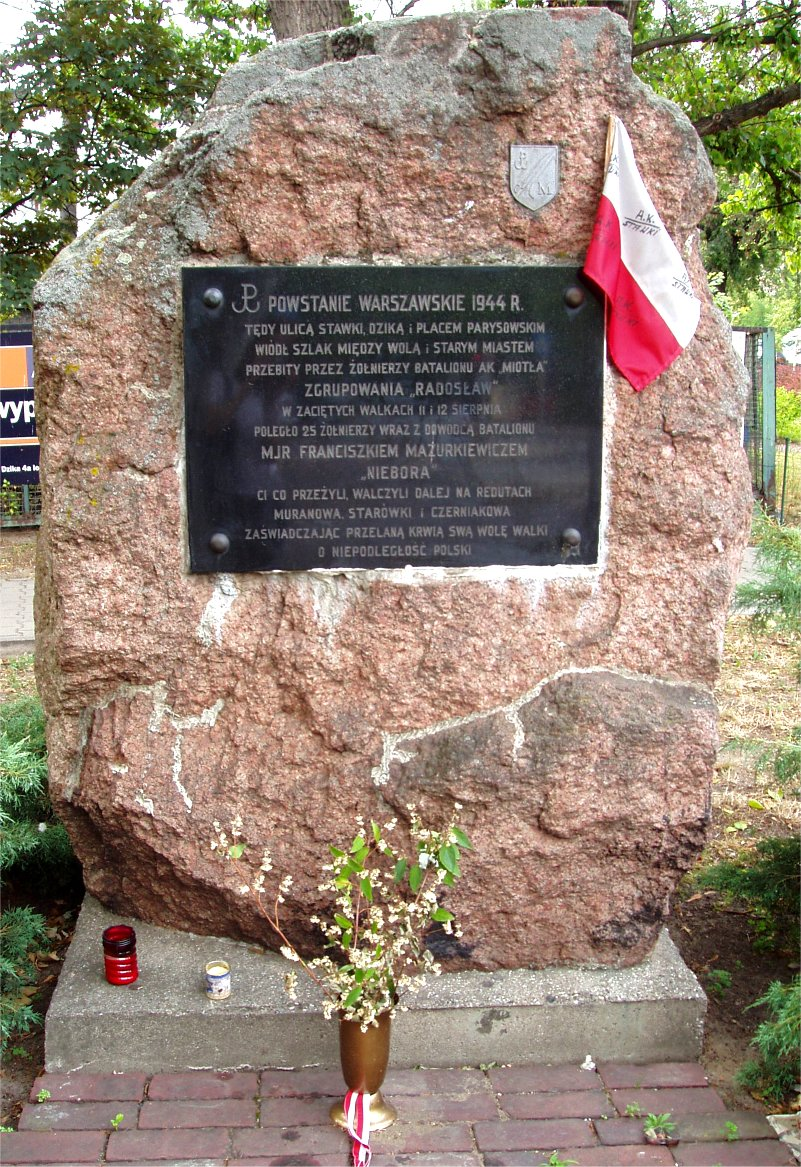 Obelisk przy ul. Stawki w Warszawie